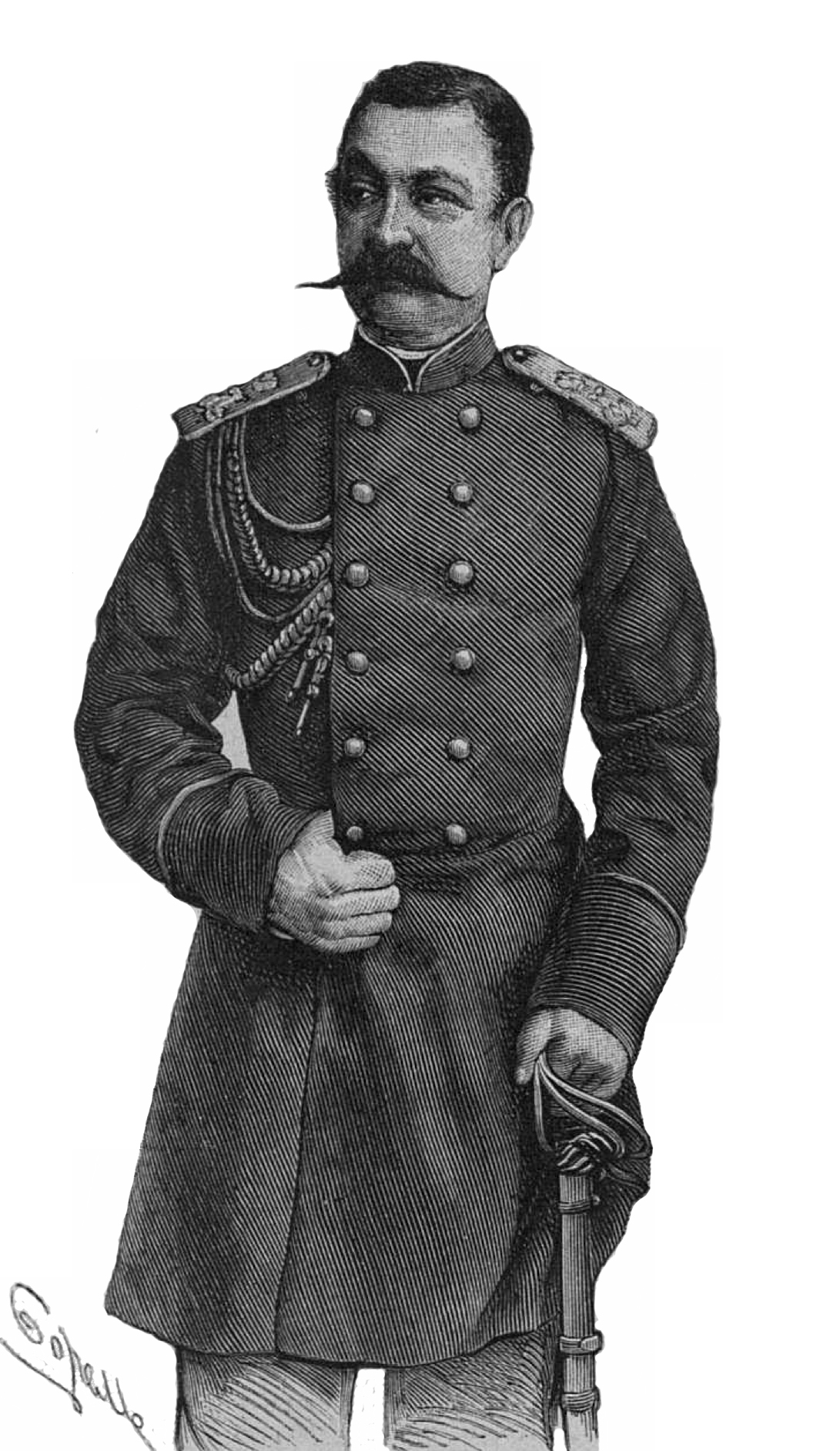 Генерал Мезенцов Николай Владимирович